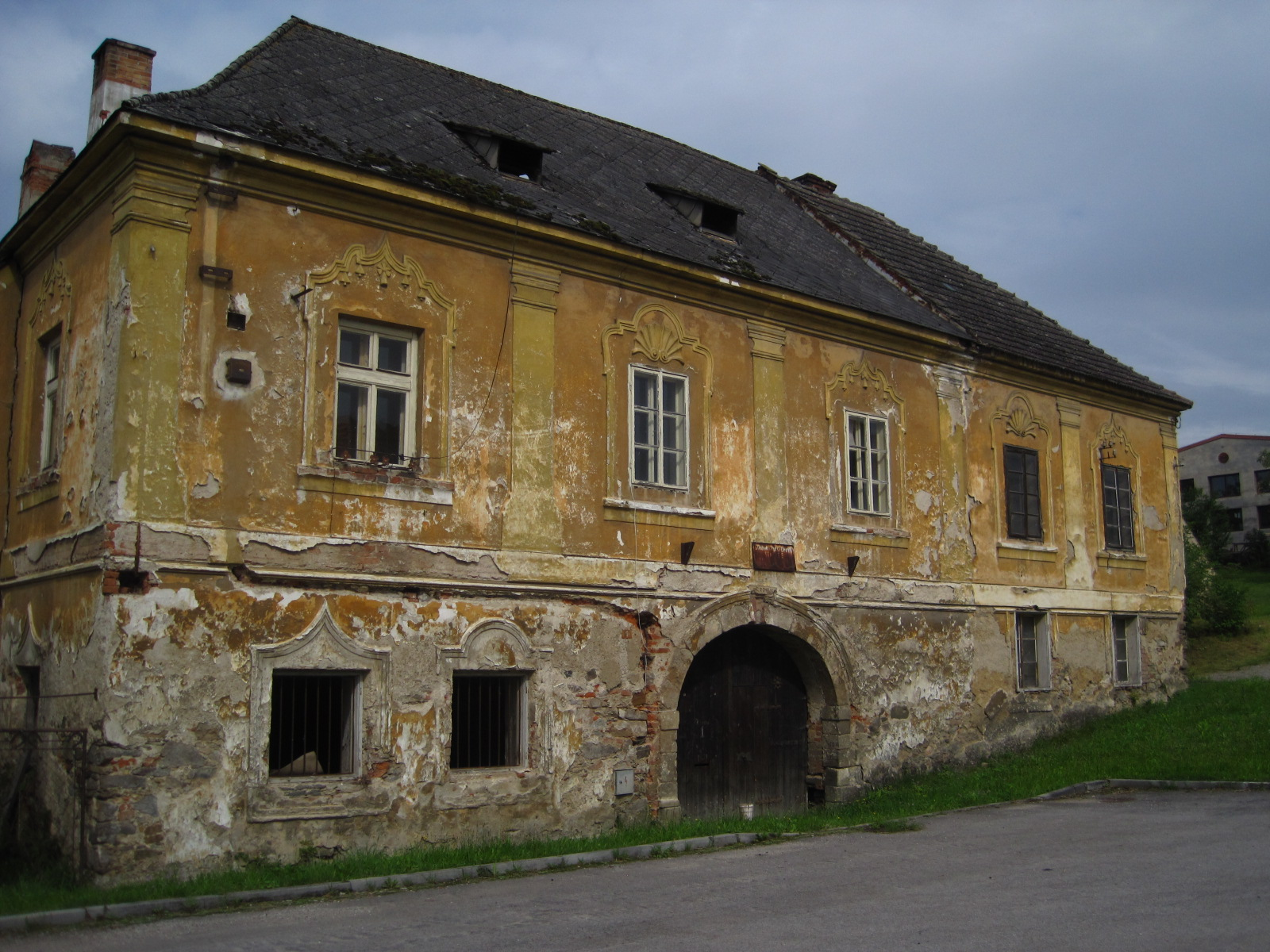 Usedlost U Filků, Přísečná 1, náves, Přísečná.